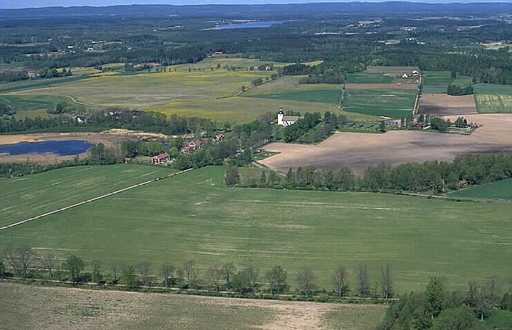 Viby kyrka i bildens mitt. Motiv: Viby Nyckelord: Flygbilder, Riksintressen Kategori: Slättbygd Viby kyrka i bildens mitt.